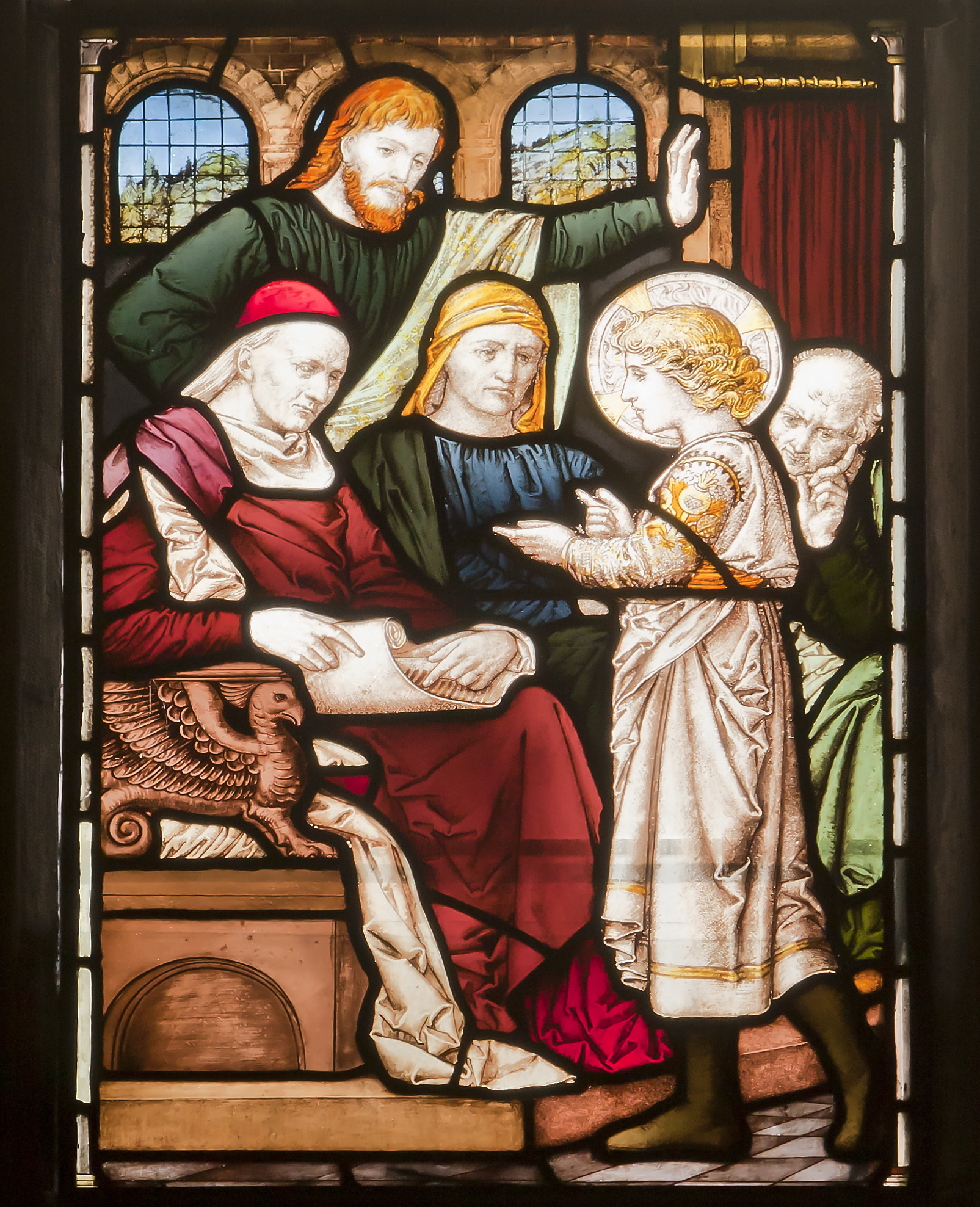 Kyrkfönster från 1800-talet i Nikolai kyrka i Örebro efter kartong av Carl Almquist. Motivet föreställer Jesu besök i templet som 12-åring.